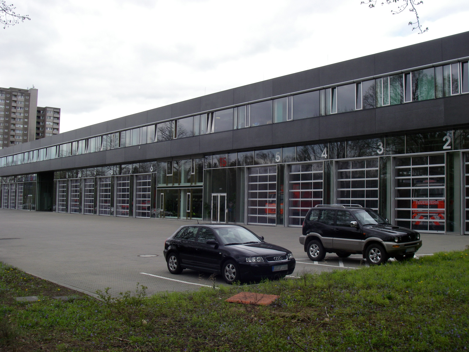 BKRZ (Wache 1) der Berufsfeuerwehr Frankfurt am Main